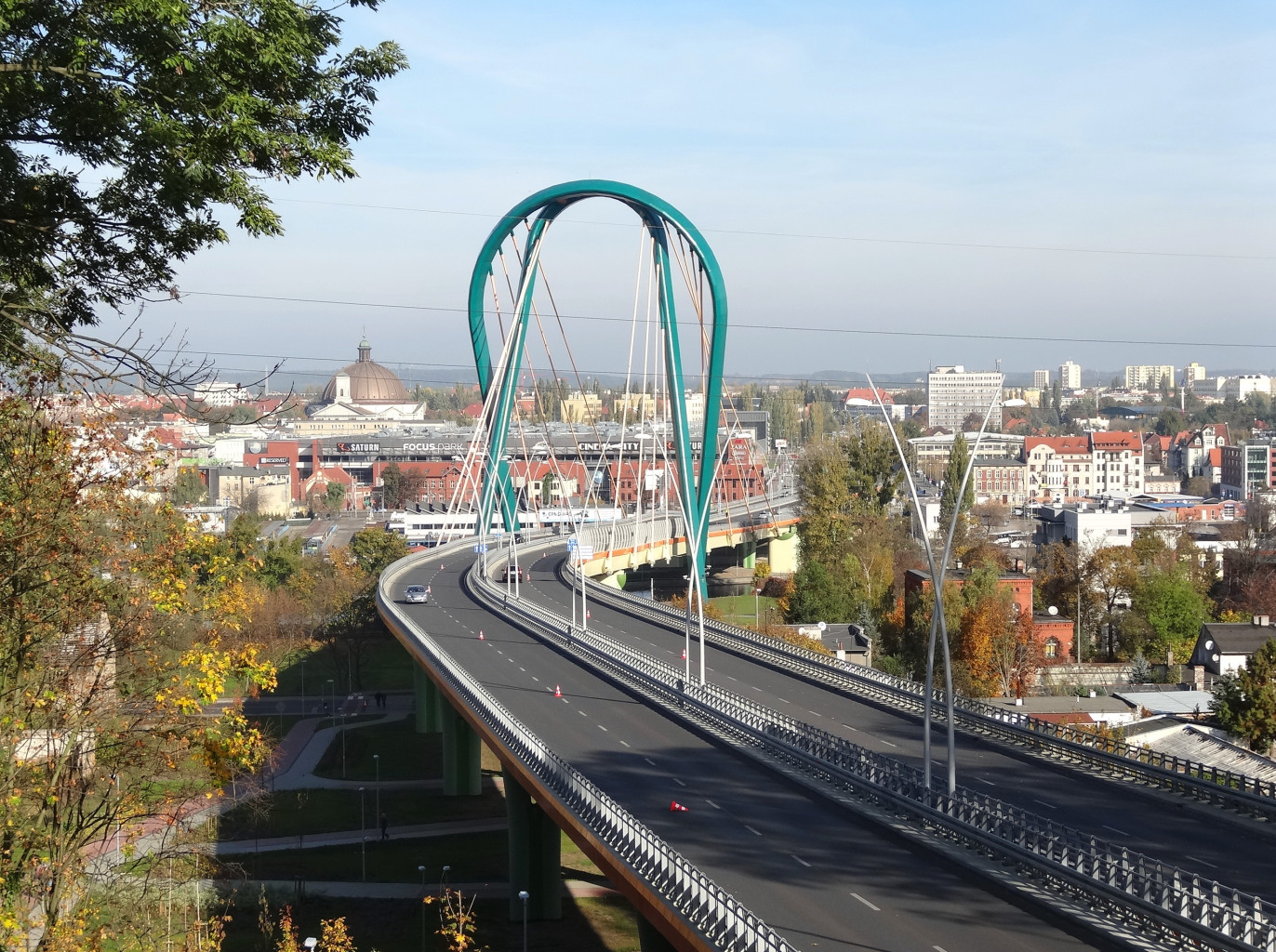 Park na Wzgórzu Wolności w Bydgoszczy